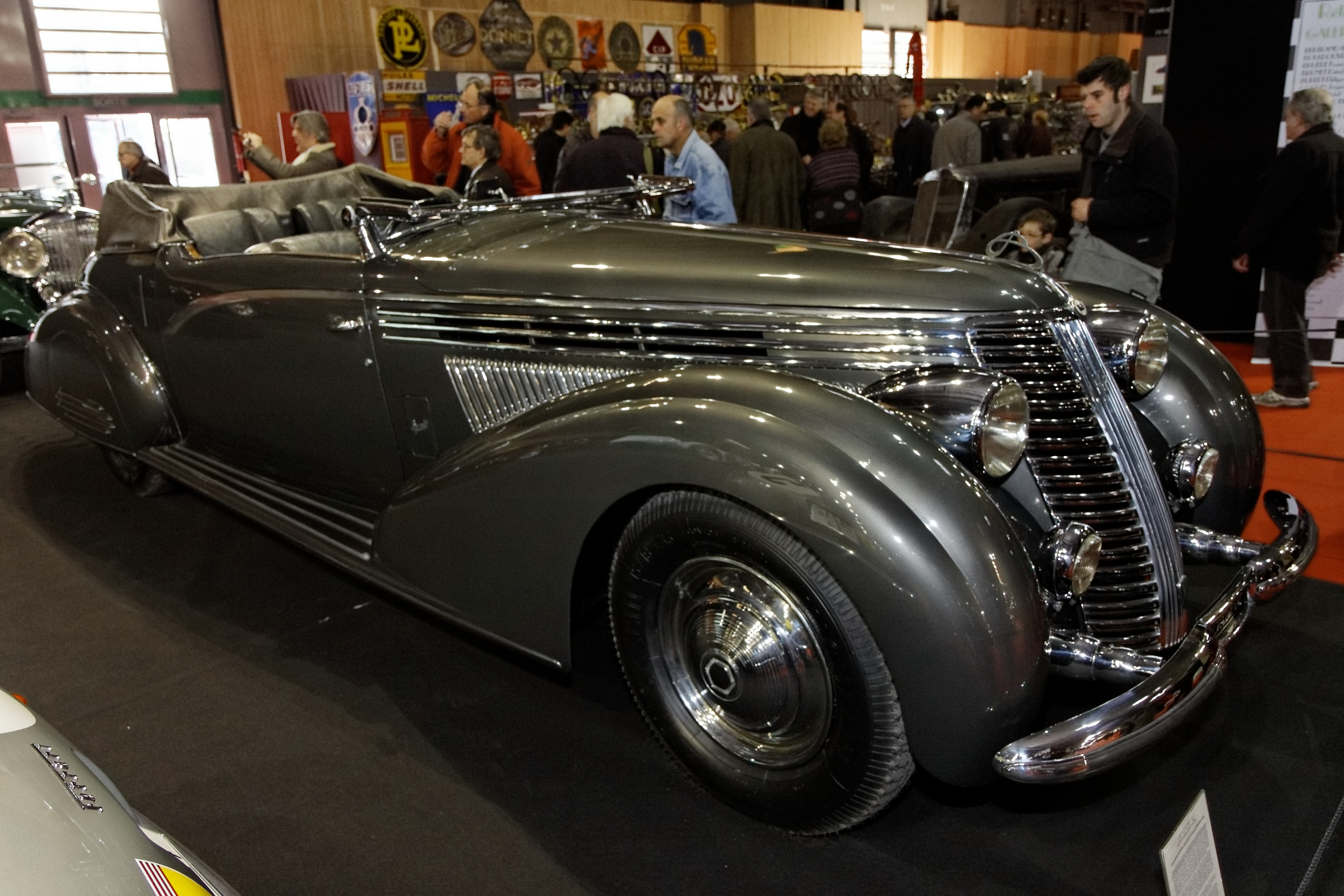 Lancia Astura 4th series